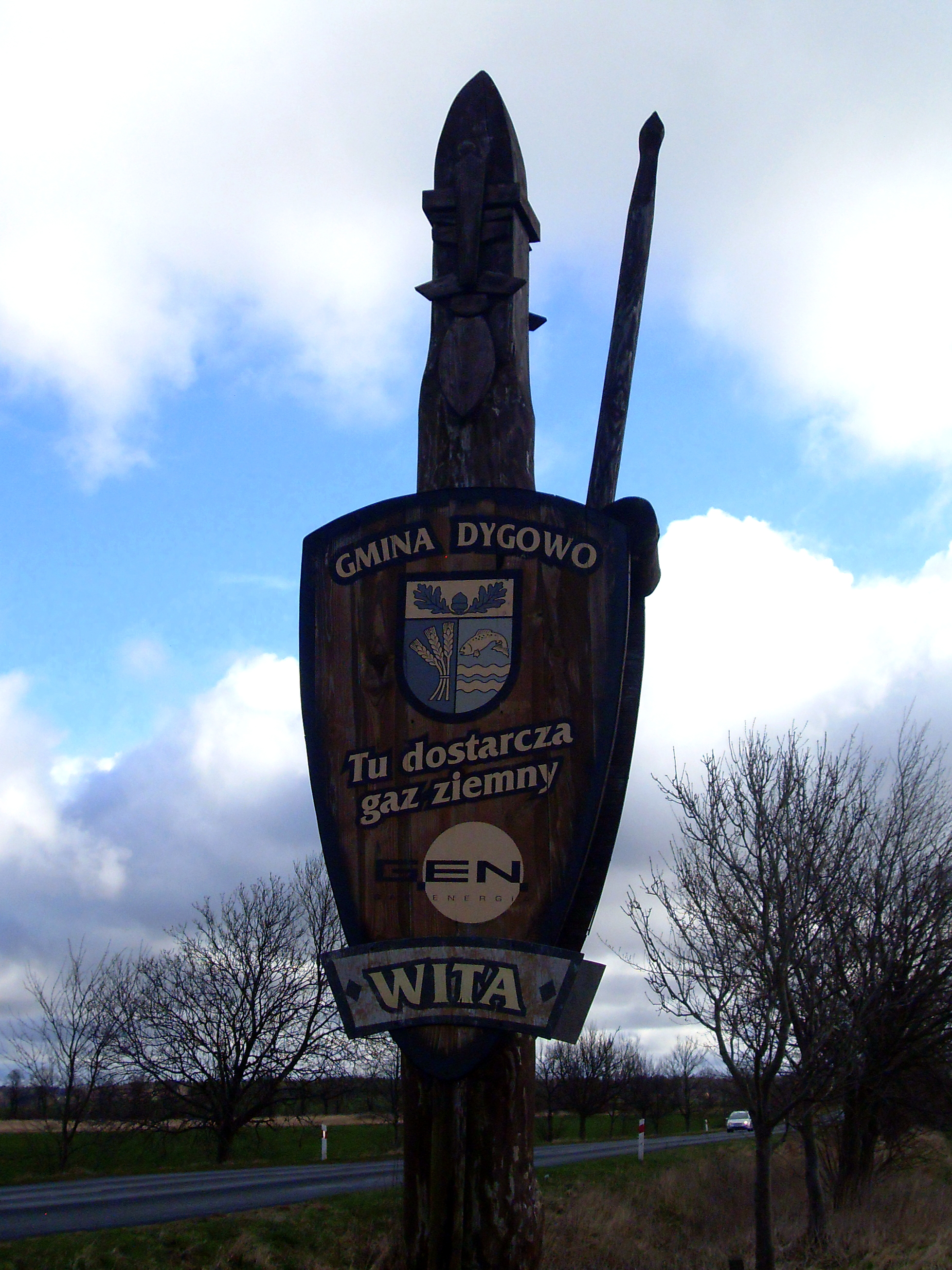 Witacz gminy Dygowo od strony Kołobrzegu